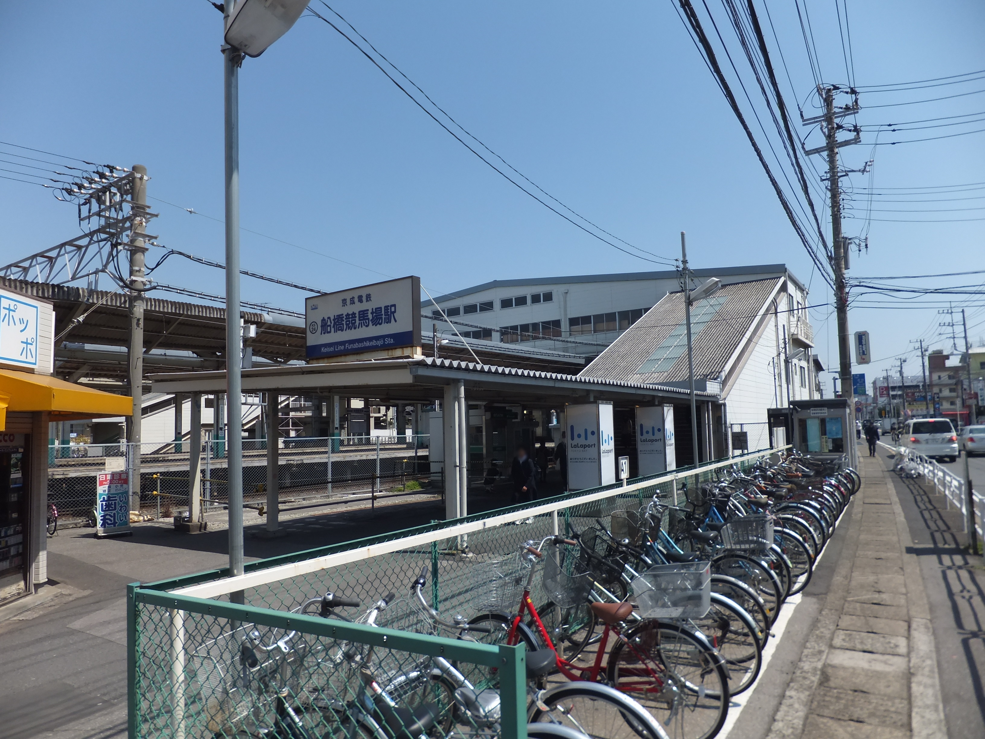 京成線船橋競馬場駅